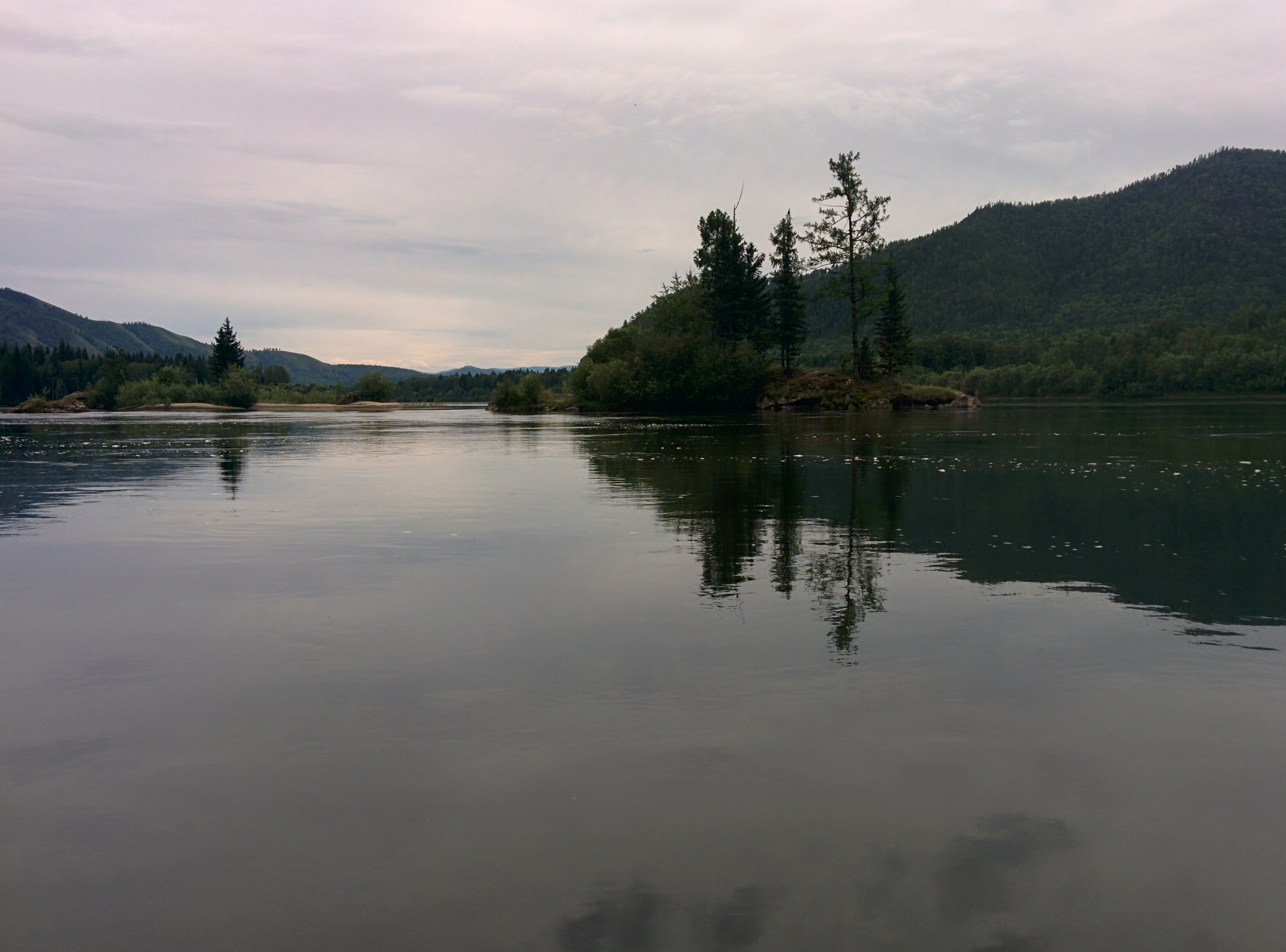 Республика Тыва, Каа-Хемский кожуун, кисельная